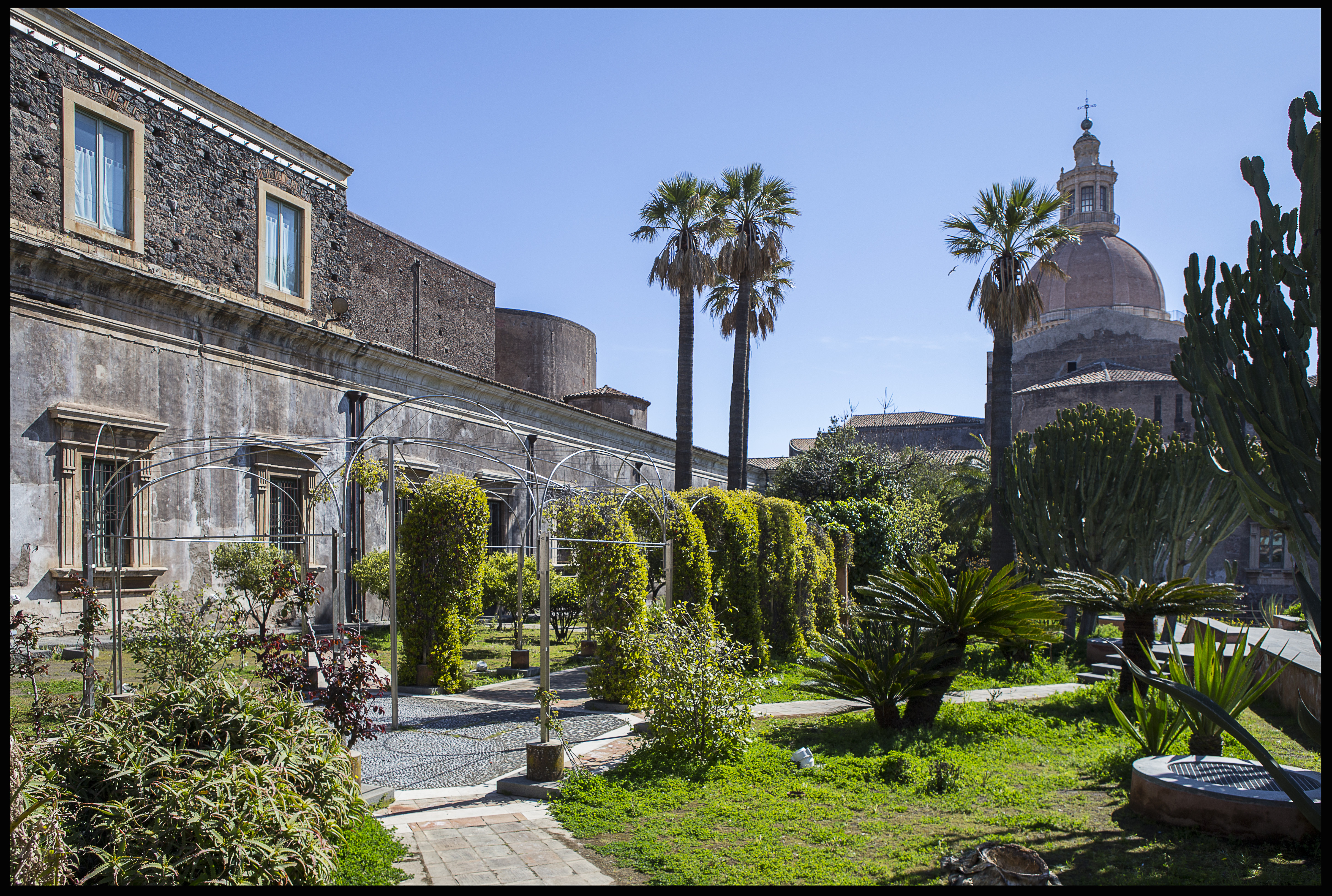 Giardino dei Novizi - monastero di San Nicolà l'Arena (Giancarlo De Carlo)